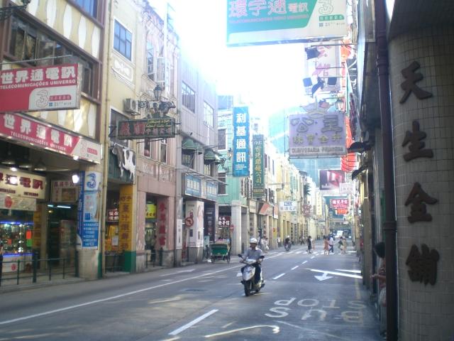 亞美打利庇盧大馬路 (新馬路), Avenida de Almeida Ribeiro Author= Mo707